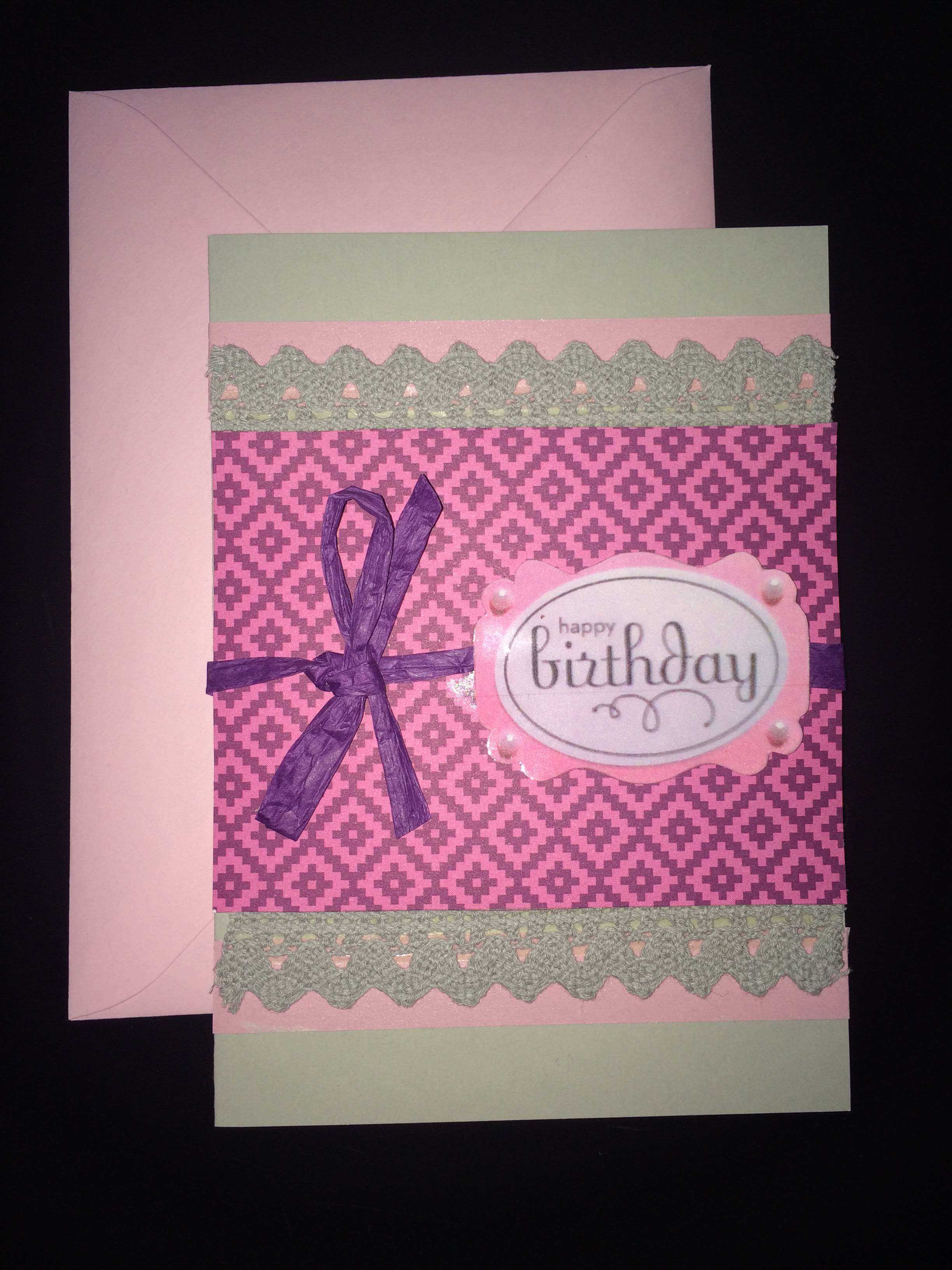 Scrapbooking